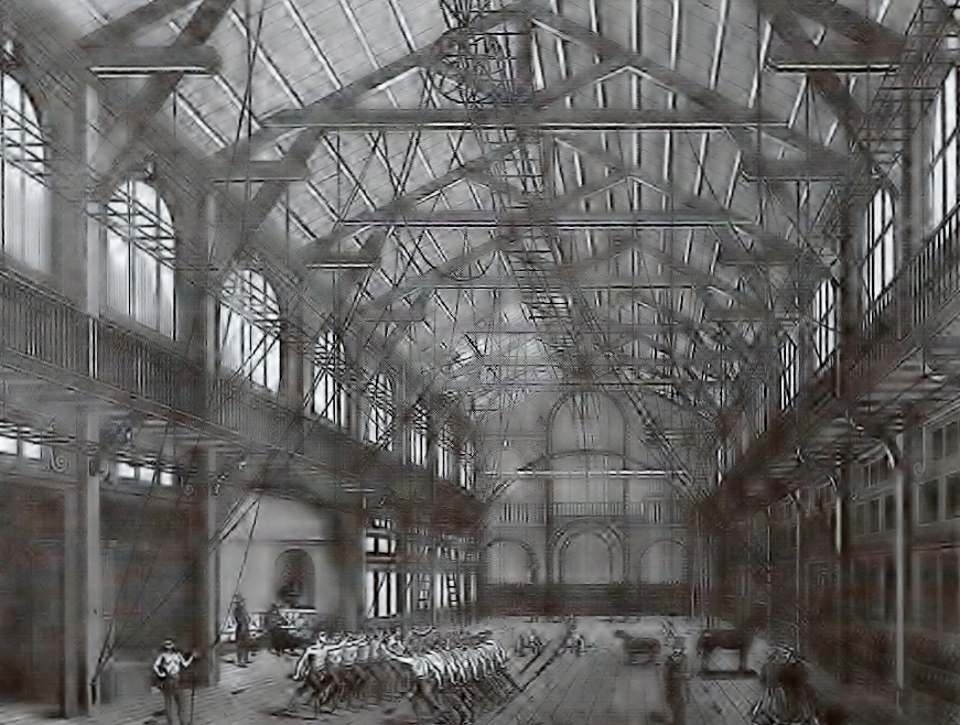 Gymnase parisien vers 1850